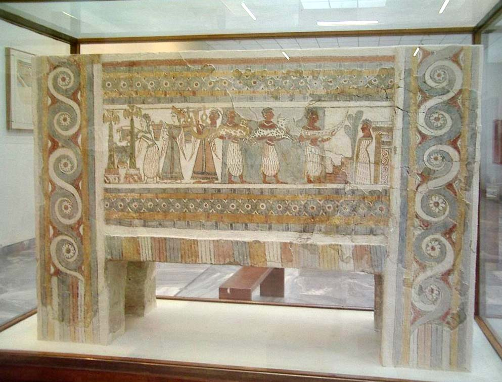 Museu arqueològic de Creta a Heràkleion